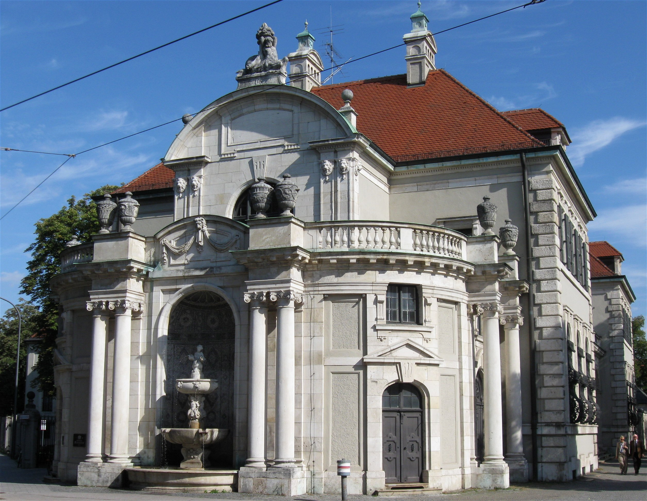 Prinzregentenstraße 3; Bayerisches Nationalmuseum, reich gegliederter, malerischer Gruppenbau des Münchner Späthistorismus, 1894–1900 von Gabriel von Seidl, 1903–07 von demselben an der Nordseite erweitert; mit Innenräumen. Zugehörig künstlerisch ausgebildete Gartenmauern und -zäune an allen Seiten. Annexe: im Westen (alter) Studienbau, später Neue Sammlung (1925-2003), mit Wandbrunnen (1900 von Josef Rauch) an der Westseite. Im südwestlichen Vorgarten Narzißbrunnen mit Bronzefigur, 1896 von Hubert Netzer. Im Osten vorspringender Trakt samt vorgelegter Terrasse, 1937–39 von German Bestelmeyer. Rückgebäude, Himbselstraße 2/2 a.